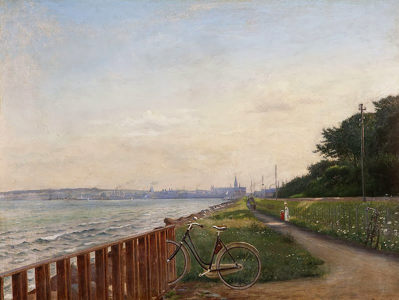 Aarhus og havnen set fra nord 1900. Julius Petersen 1851 - 1911. Nr. 2870